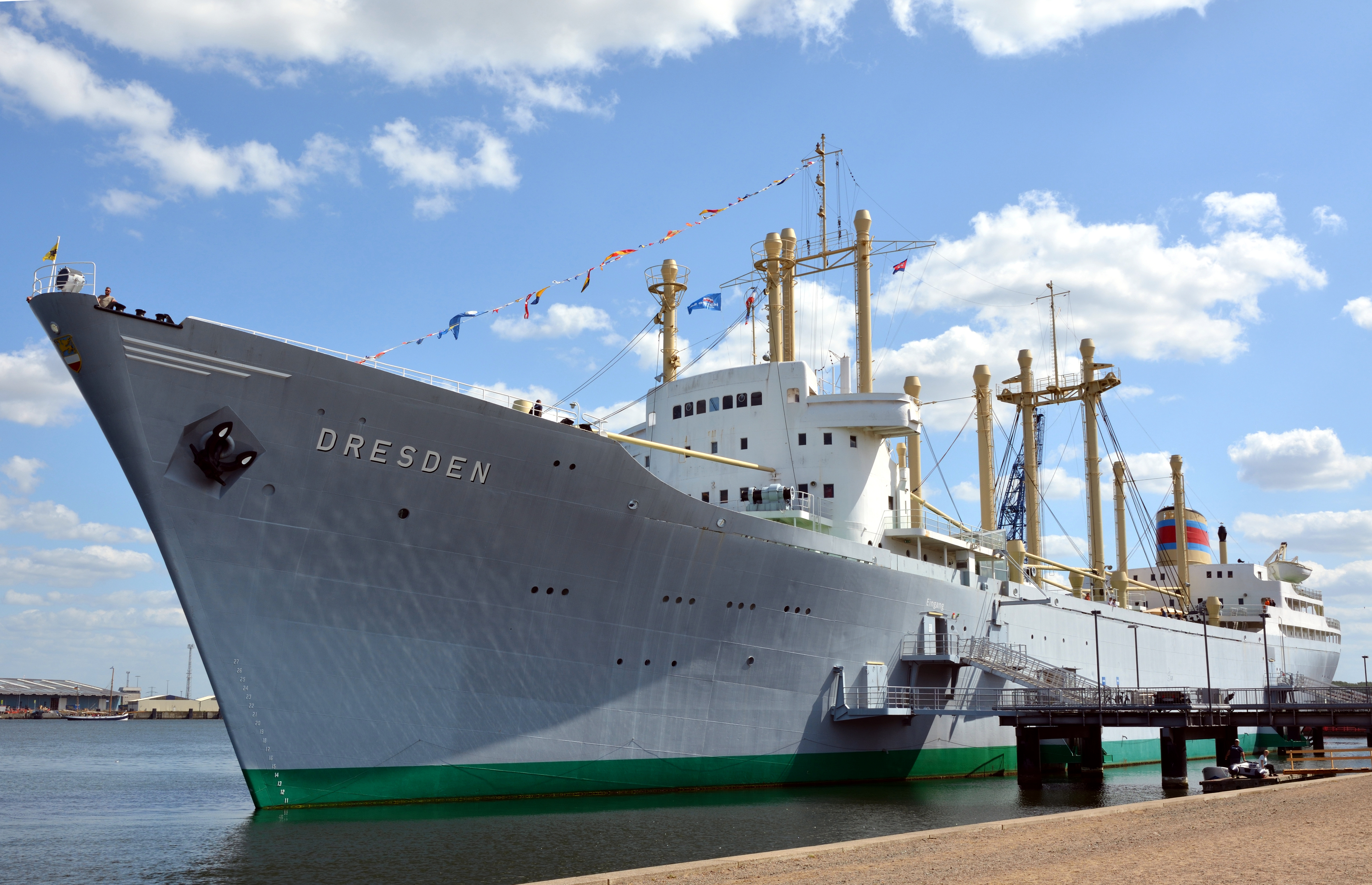 Das Museumsschiff "Dresden" in Rostock.